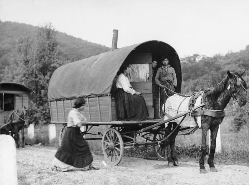 Rheinland, Sinti und Roma mit Wohnwagen auf Landstraße Zigeuner am Rhein. Aufnahme 1935 22523-35